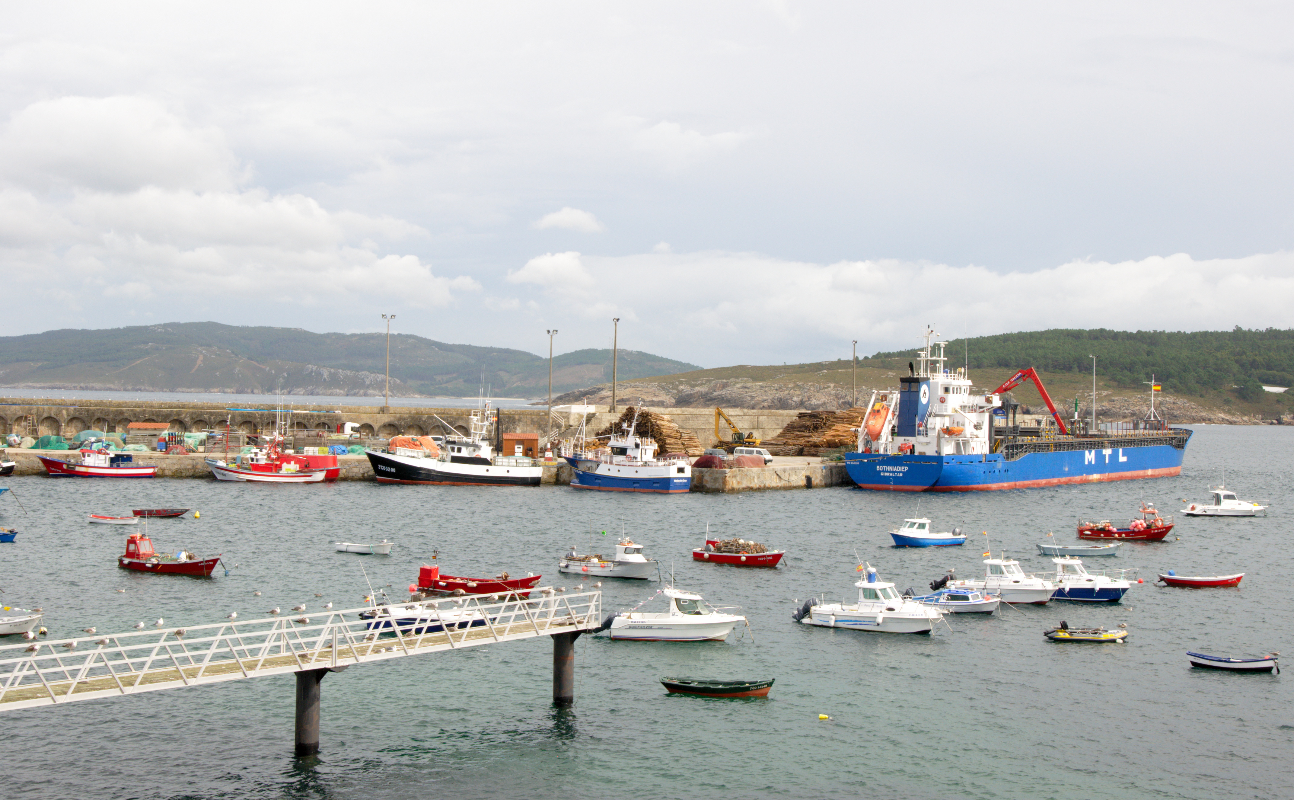 Puerto de Laxe, Galicia